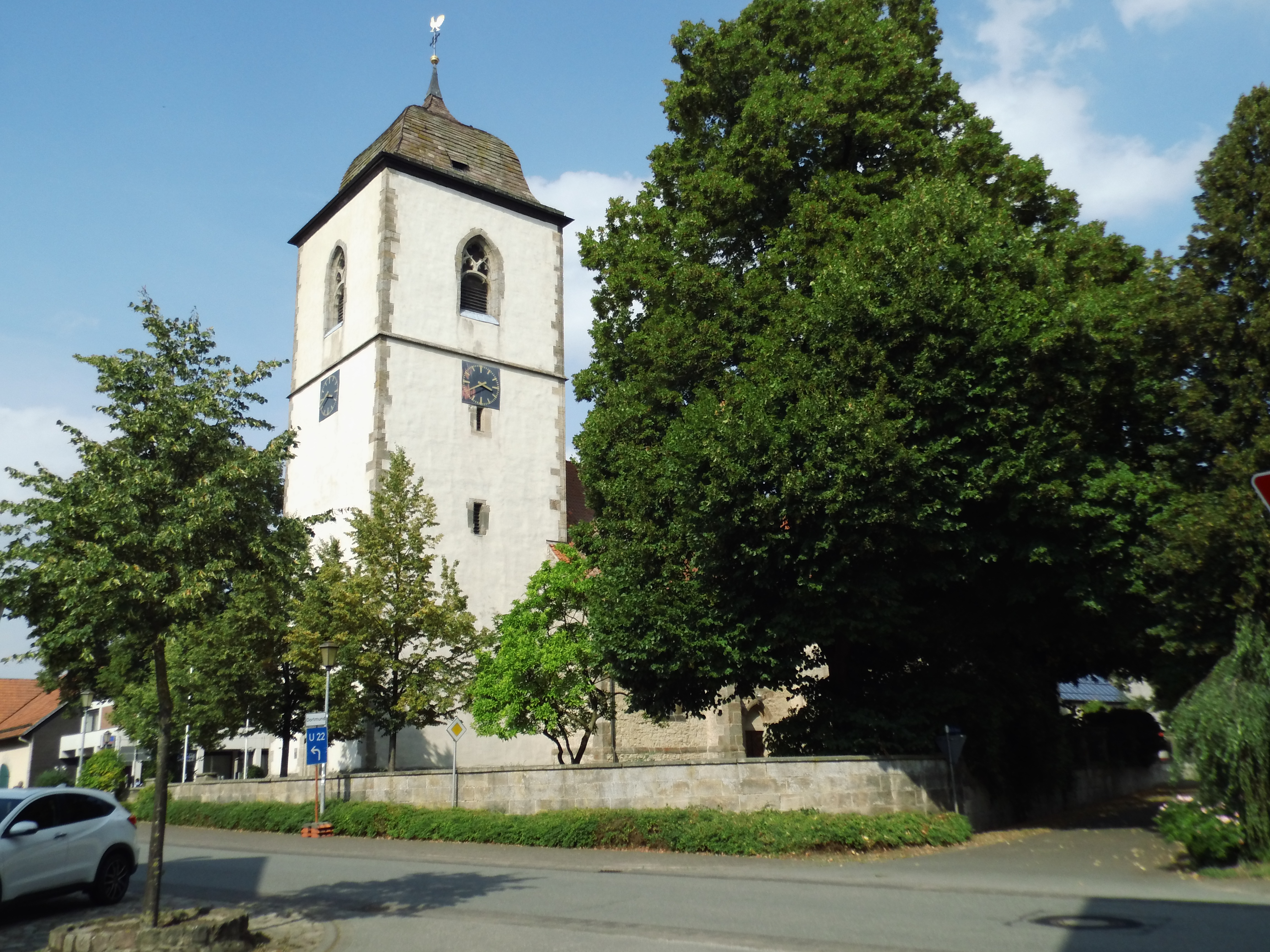 Mehrfach umgebaute Pfeilerbasilika aus dem 14. Jahrh. mit ausladendem Querschiff; vorgelagerter Wehrturm mit barocker Schweifhaube von 1688; Baudenkmal, Liste der Baudenkmäler in Willebadessen Nr. 31